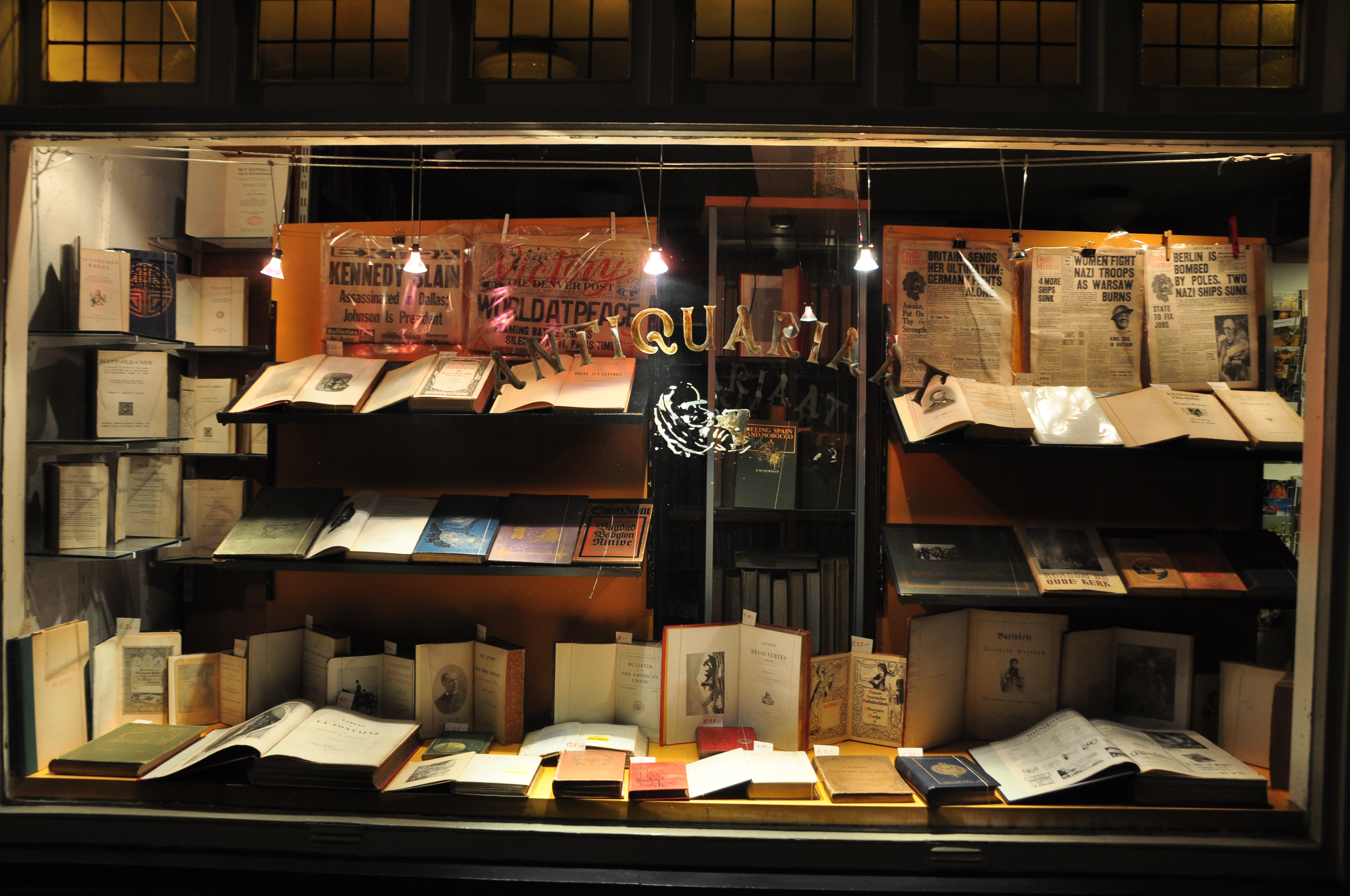 (Verdwenen) Antiquariaat Oude Spiegelstraat 2, Amsterdam 2011